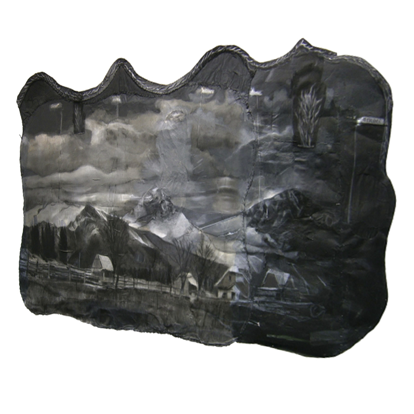 Christian Riebe, Singe!; 2012; versch. Materialien; 170 x 310 cm